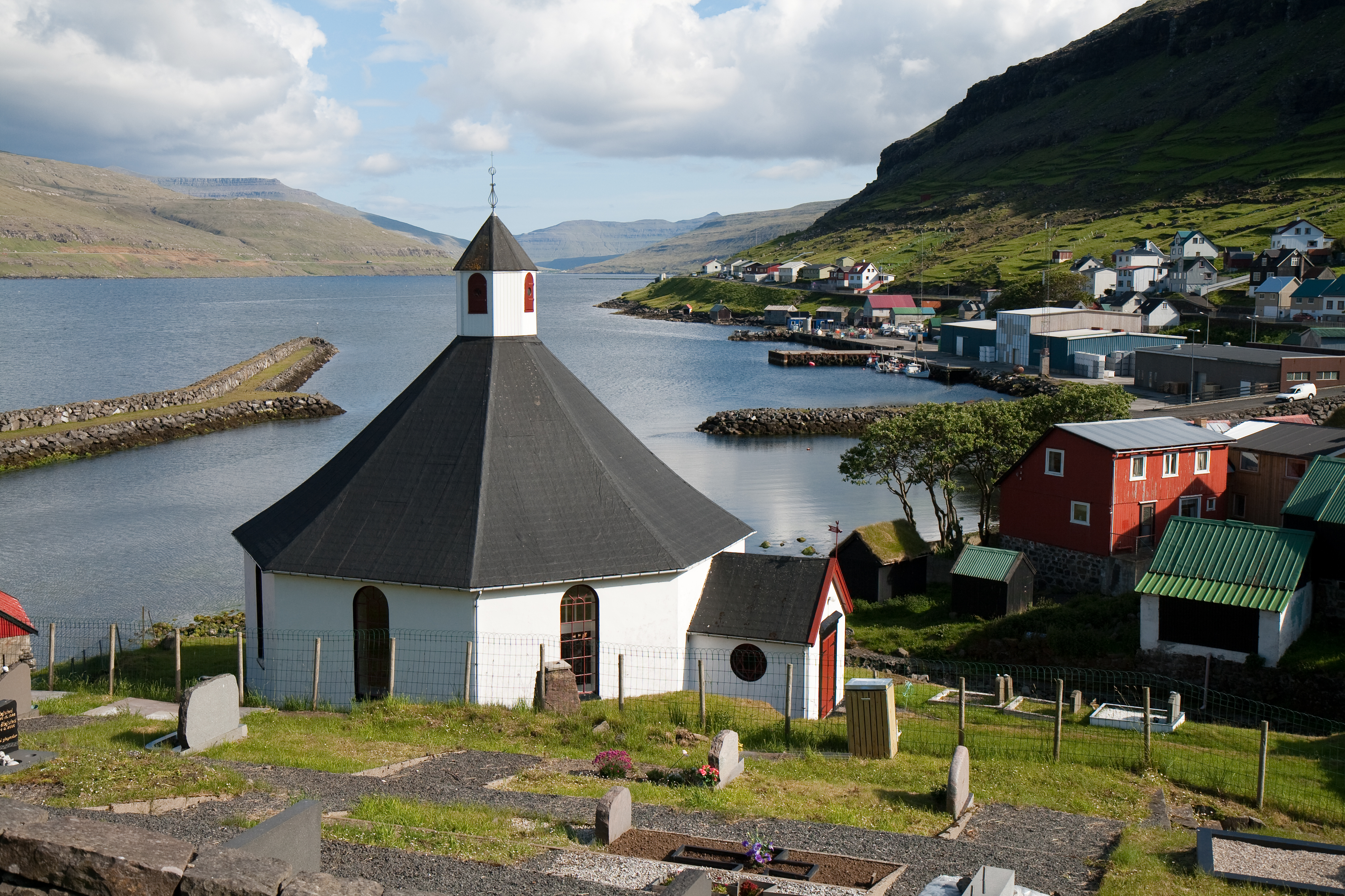 Haldarsvík, Faroe Islands